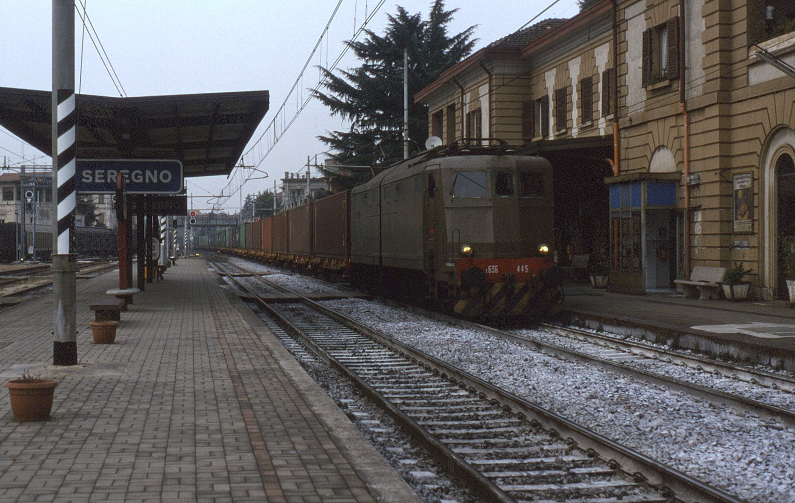 Treno merci trainato dalla locomotiva E.636.445, in transito da Seregno